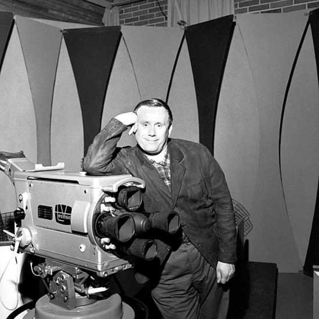 Suomalainen jazzmuusikko, toimitusjohtaja ja juontaja Jaakko Jahnukainen (1925-1980) 1960-luvun alkuvuosina Tesvision studiolla. Hän juonsi Levyraati-ohjelmaa vuosina 1961-1980